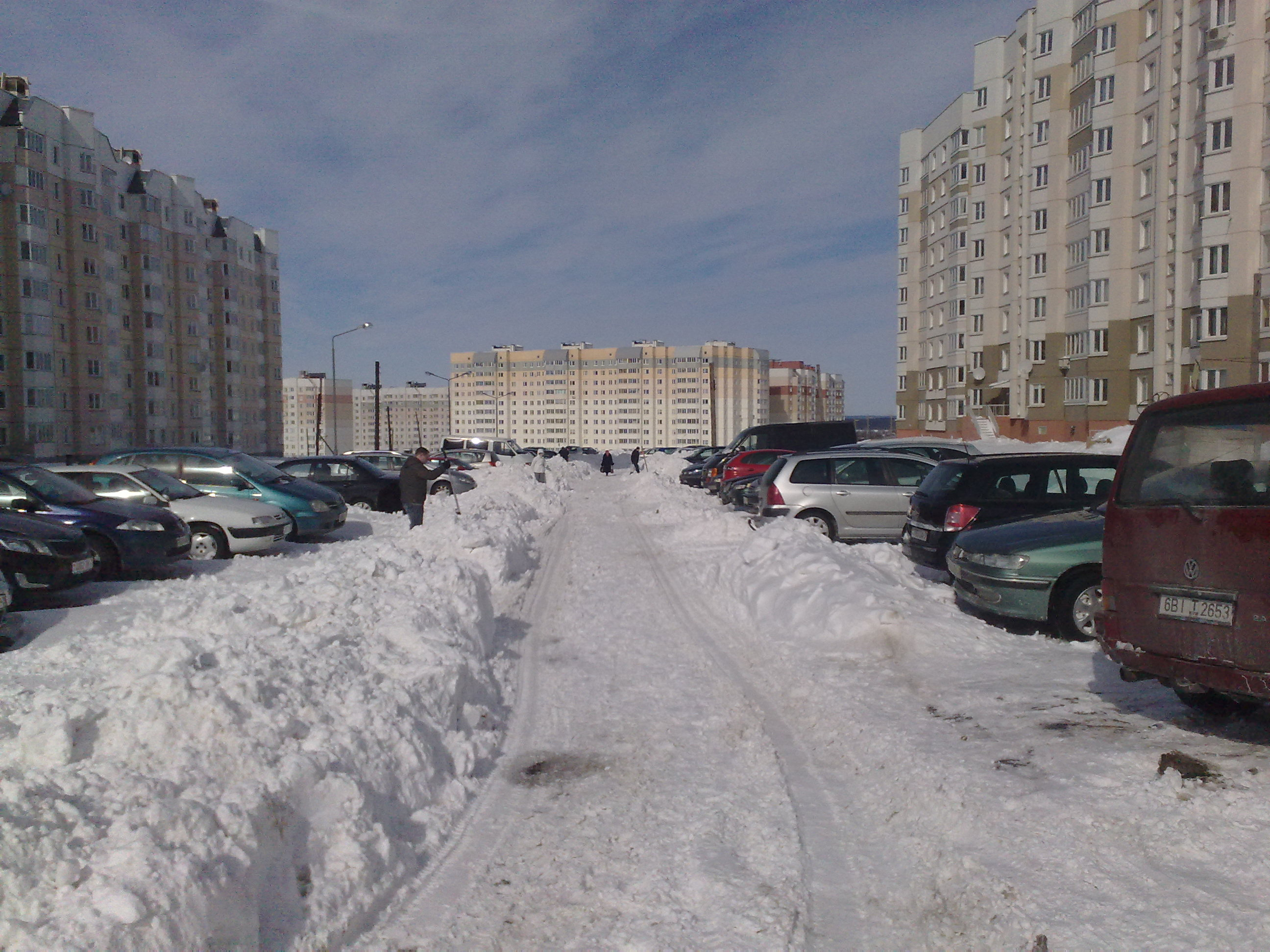 Dambroŭka 6